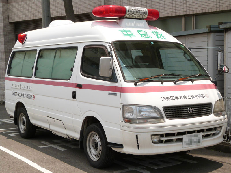 正面に大きく反転文字が書いてあるタイプ